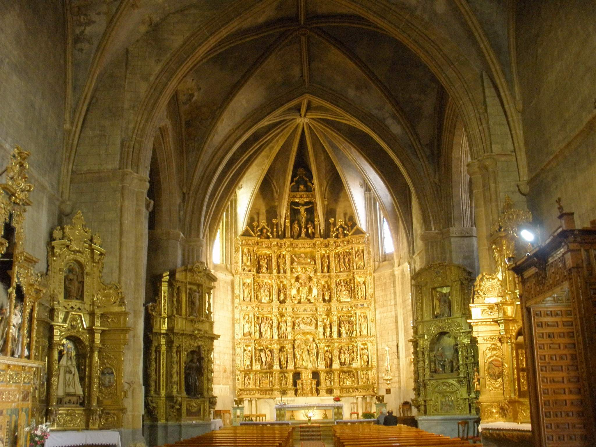 San Cebrián de Campos (Palencia) - Iglesia de San Cornelio y San Cipriano